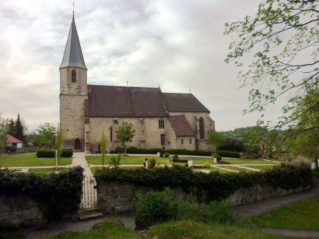 Die Frauenkirche im alten Teil des Unterriexinger Friedhofs.